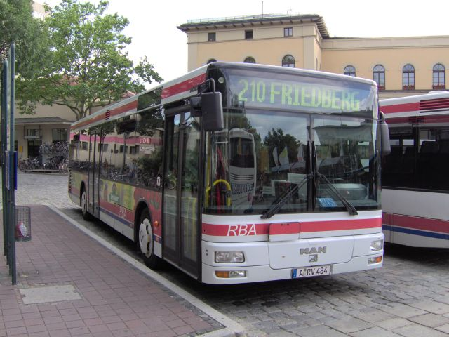 Von mir fotografierter MAB Bus, von der RBA mit Werbung für Dehner.